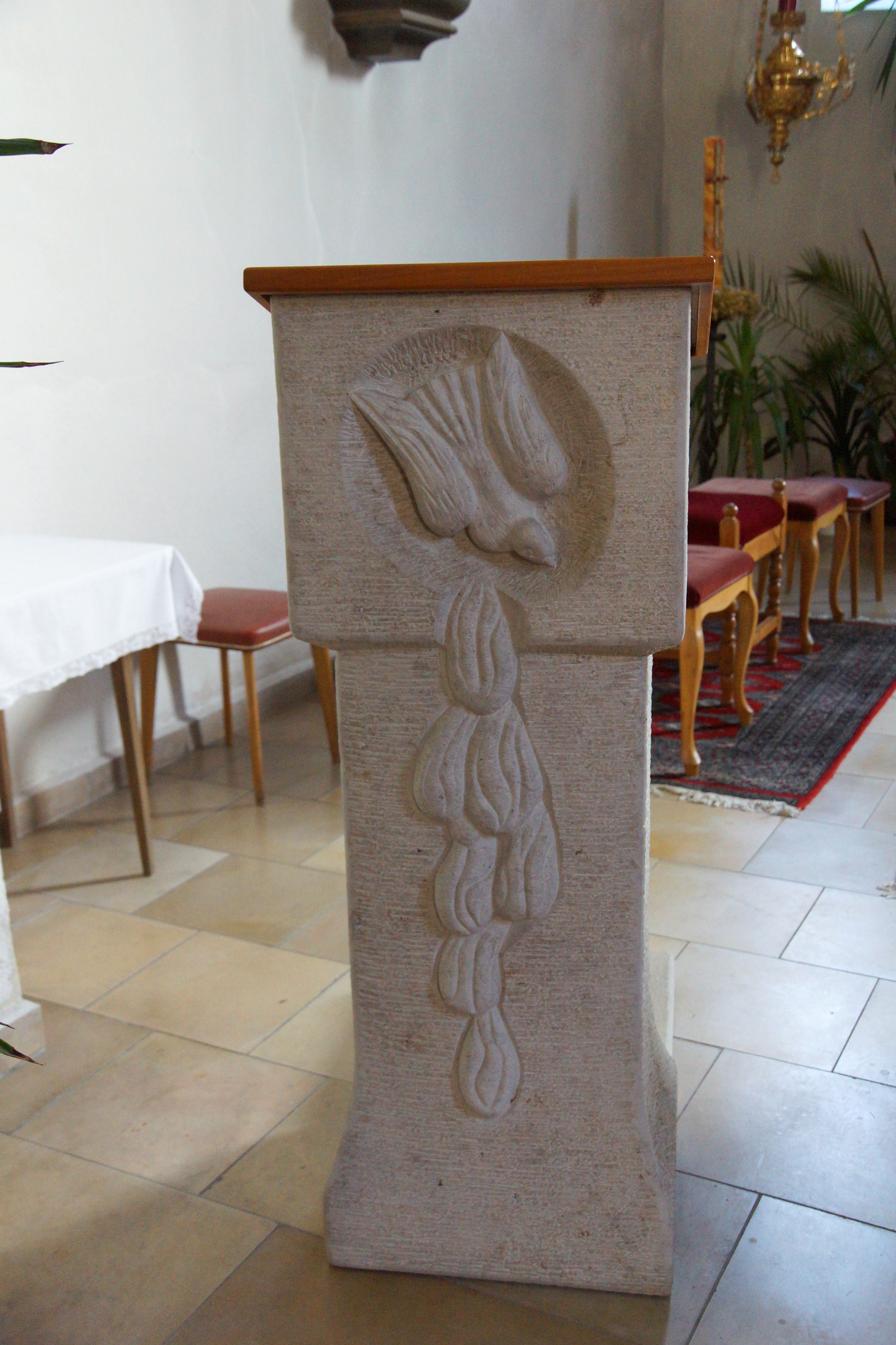 Die Marktkirche St. Christophorus in Kastl im Lauterachtal